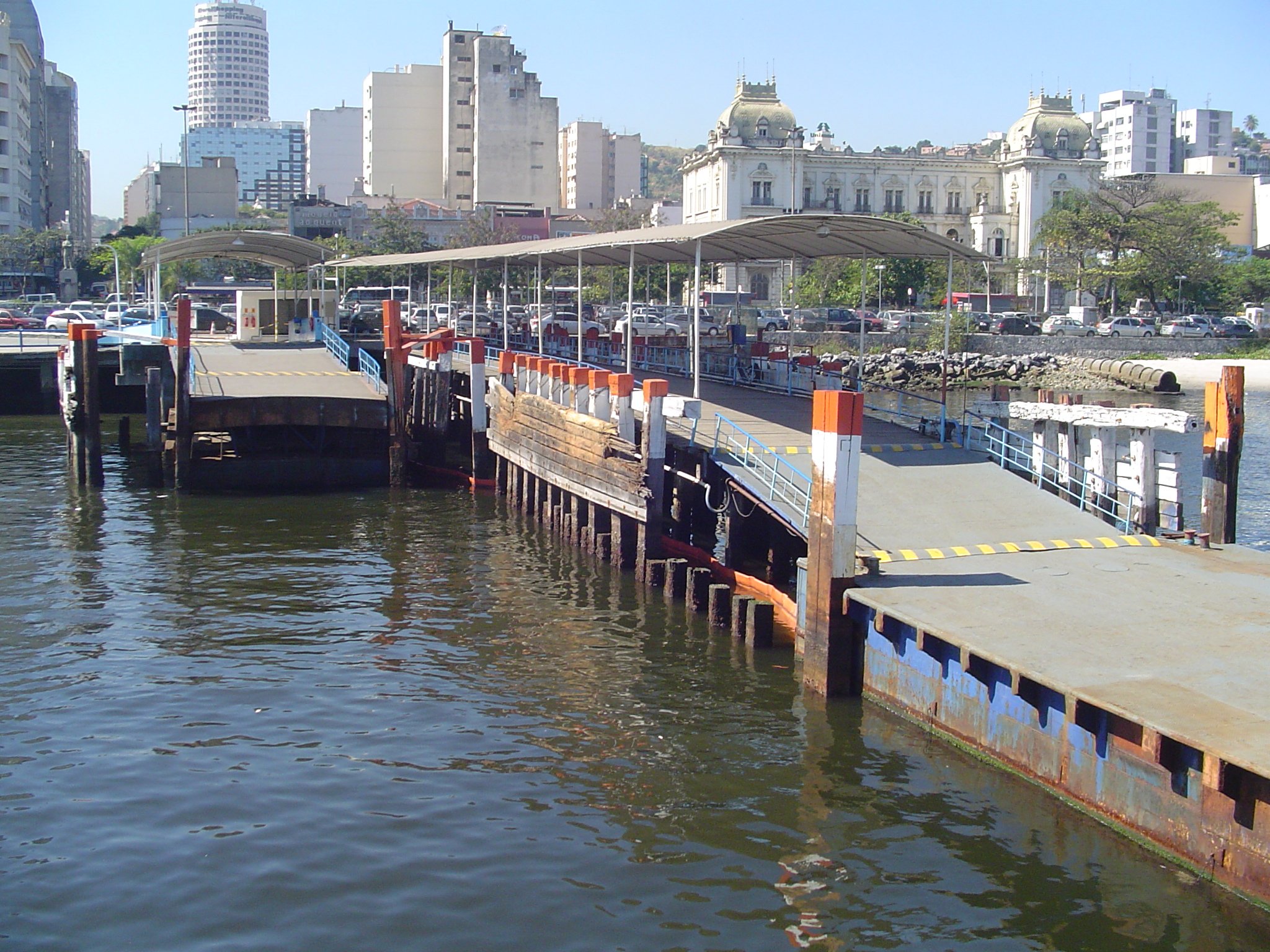 Niteroi, Brasileniterói